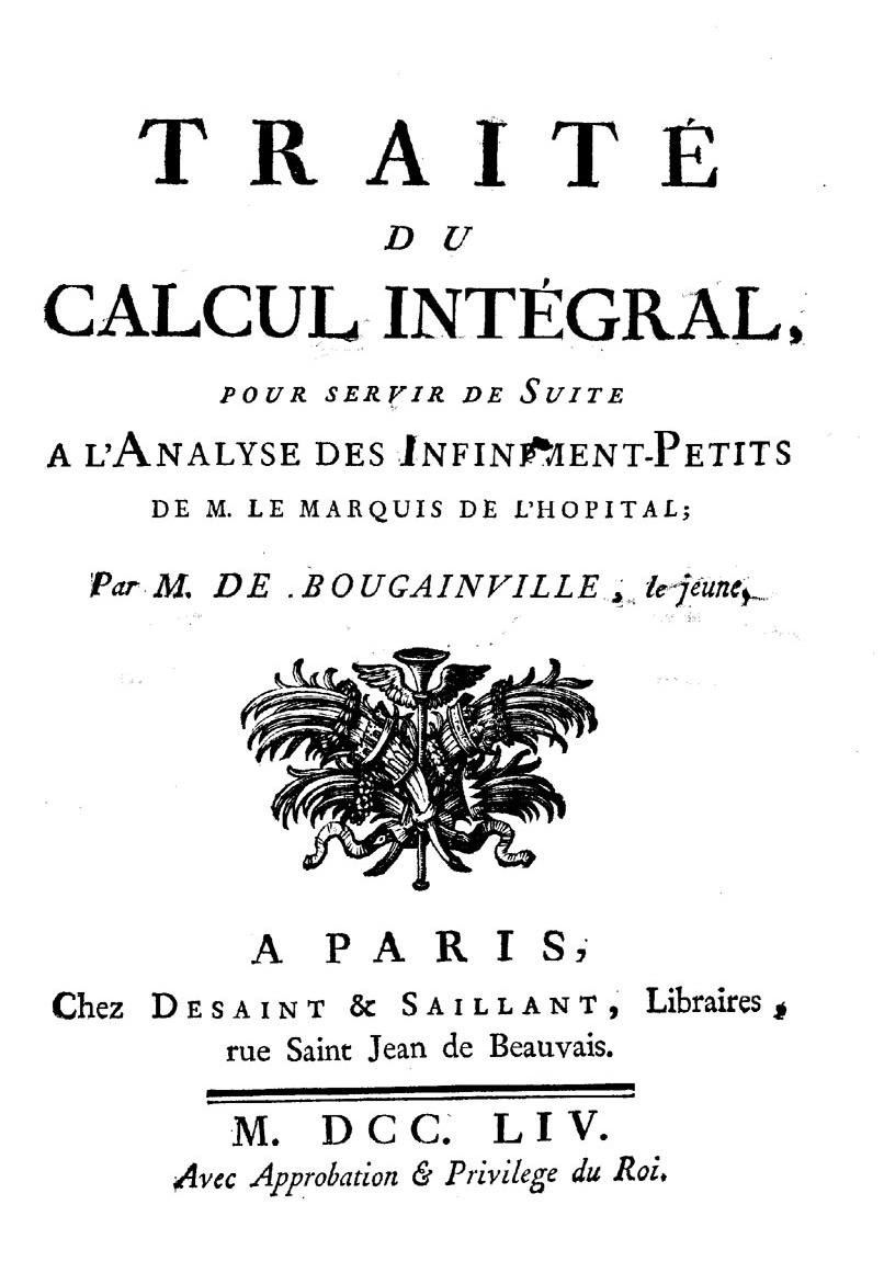 Traité du calcul intégral, pour servir de suite a l'analyse des infiniment-petits de m. le Marquis de L'Hopital; par m. de Bougainville, le jeune. [1.]. - A Paris : chez Desaint & Saillant, 1754. - XXIII, [1], 340 p., [2] c. di tav. : ill. ; 4º .